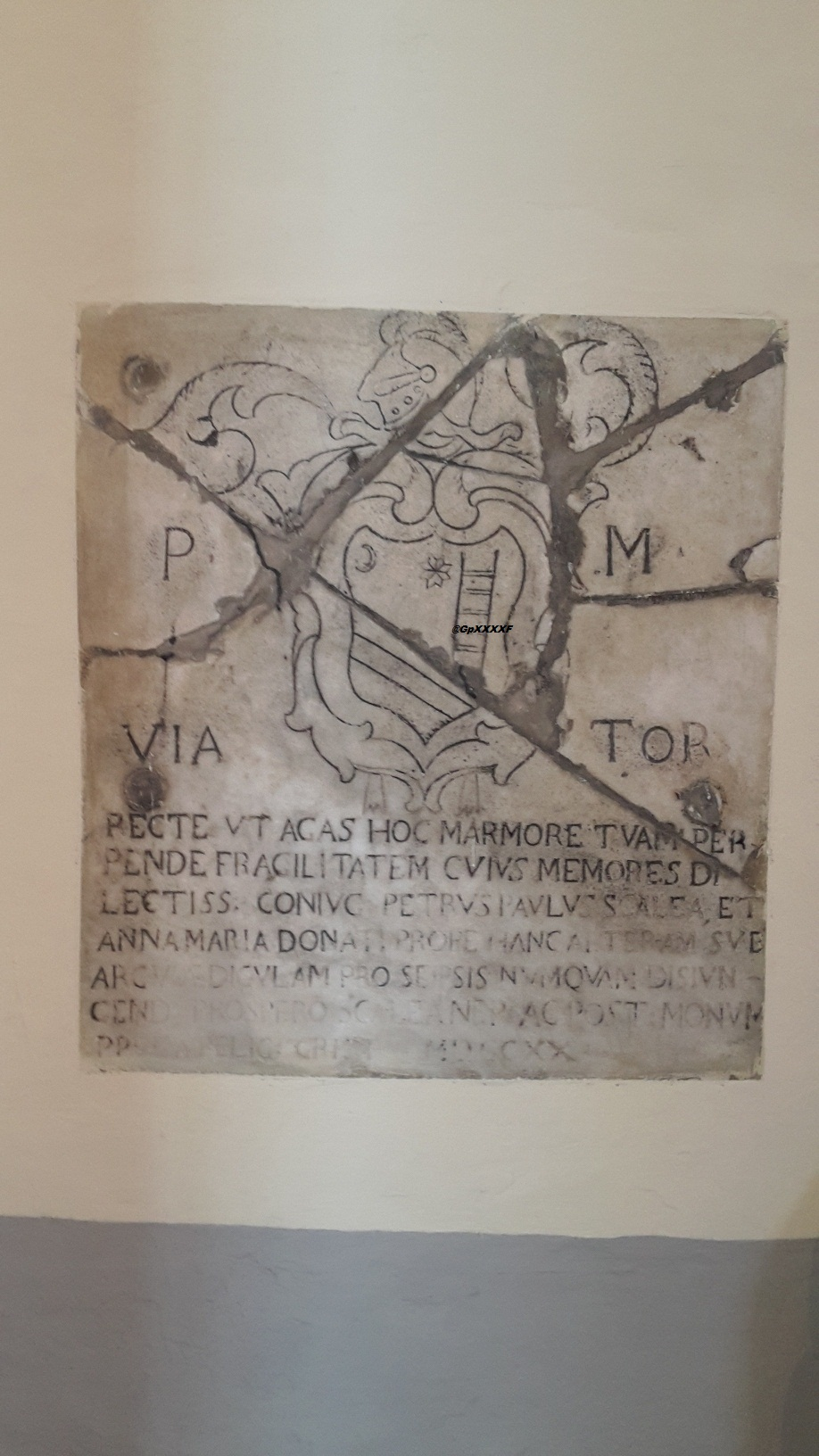 Stemma di Casa Scalea di Aiello a Sava (Baronissi)